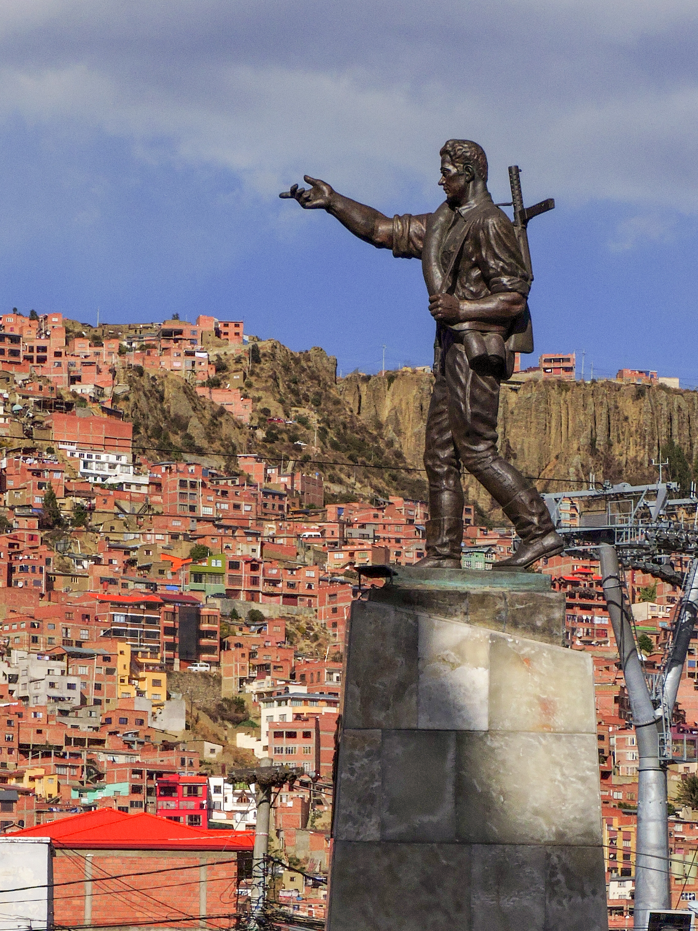 Monumento a Germán Busch Becerra This medium shows the protected monument with the number L/00-228 in Bolivia.